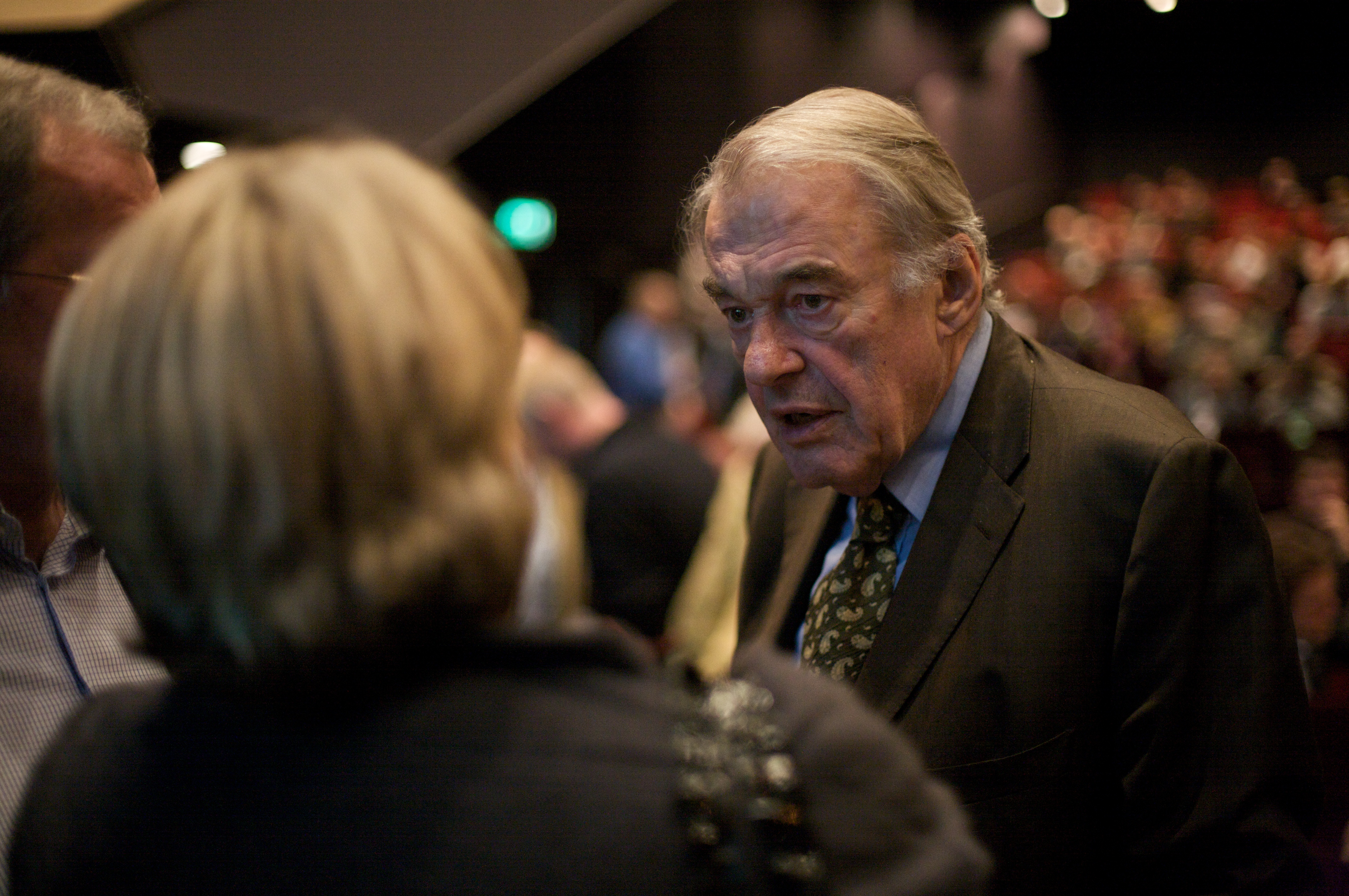 Hans van Mierlo op een D66-congres (2009)